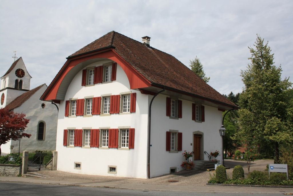 Gemeindehasu und Kirche Egliswil